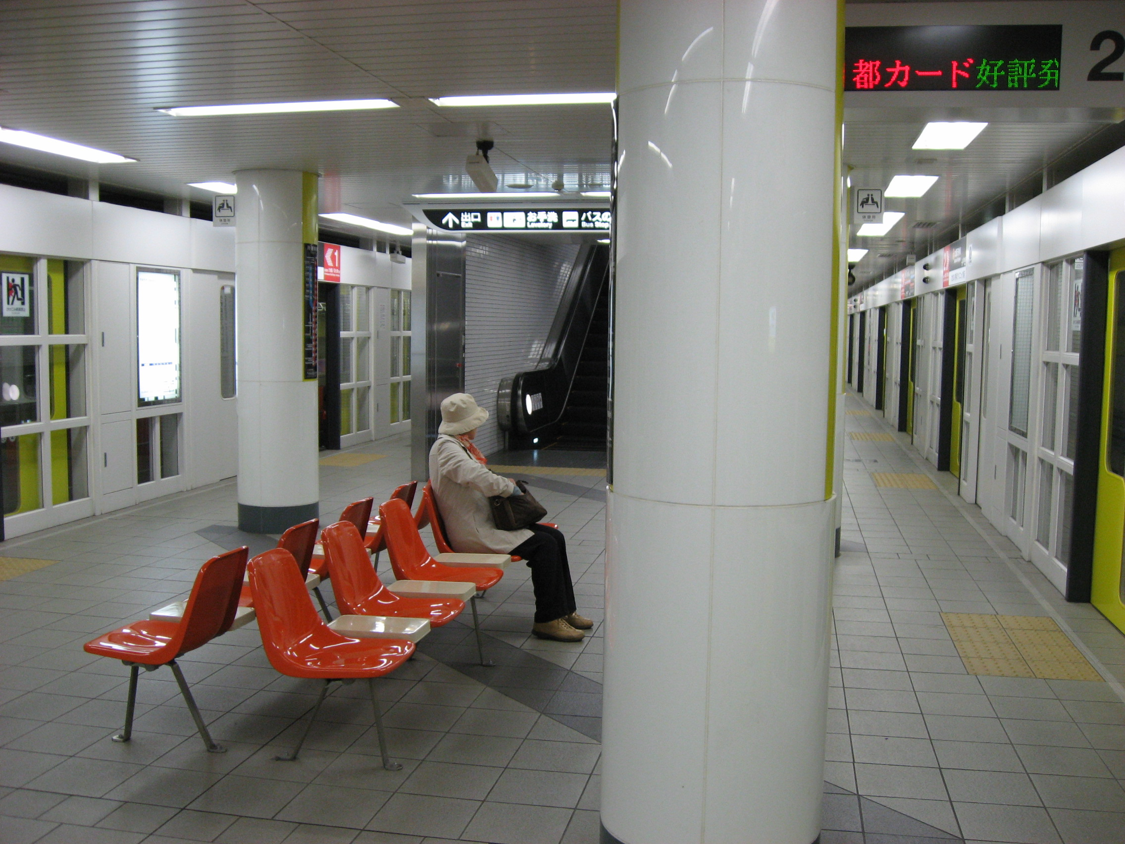 太秦天神川駅プラットホーム